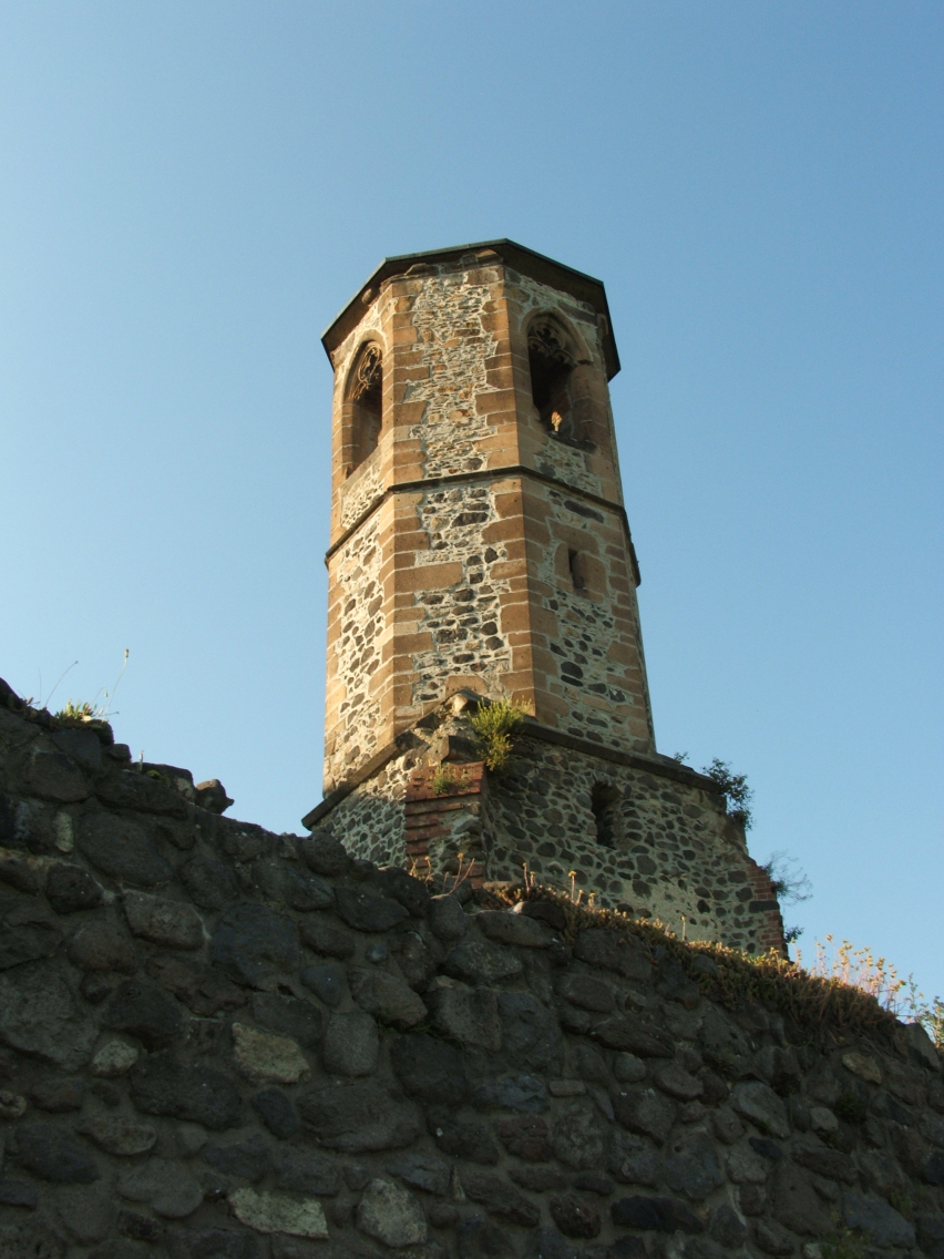 A kisnánai vár